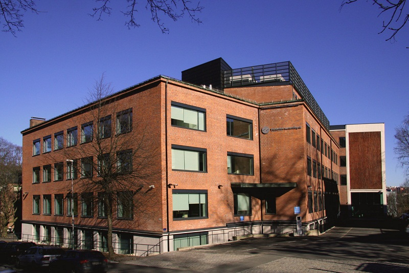 Statistisk sentralbyrås kontor i Akersveien 26, Oslo, Norge.